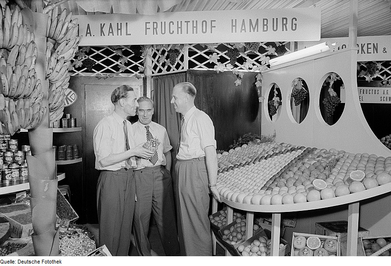 Original image description from the Deutsche Fotothek Drei Männer umgeben von exotischem Obst auf der Leipziger Herbstmesse 1954